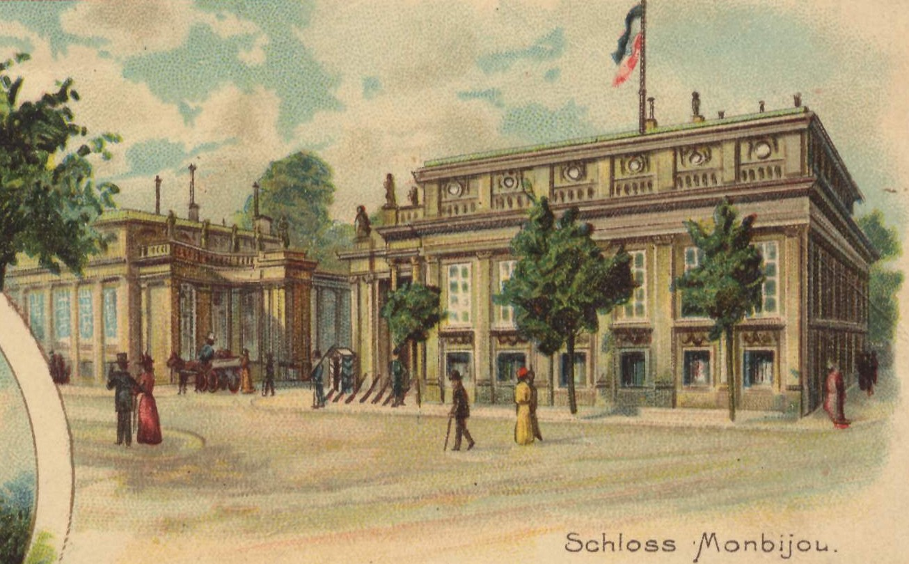 Schloss Monbijou, 1903